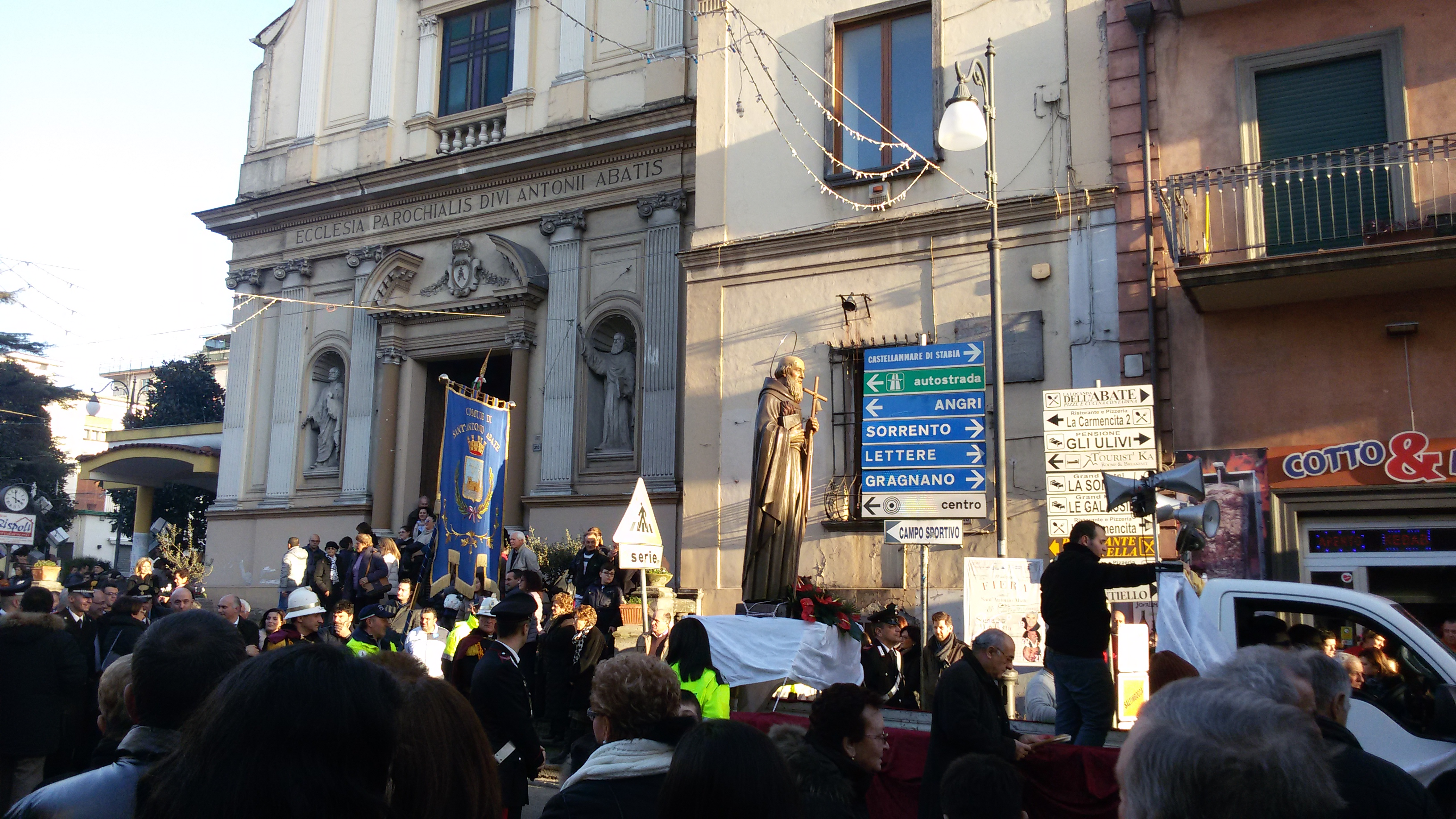 Processione patronale in Sant'Antonio Abate, in provincia di Napoli. Licenza d'uso Copyright Emmanuele Fattoruso 2015.